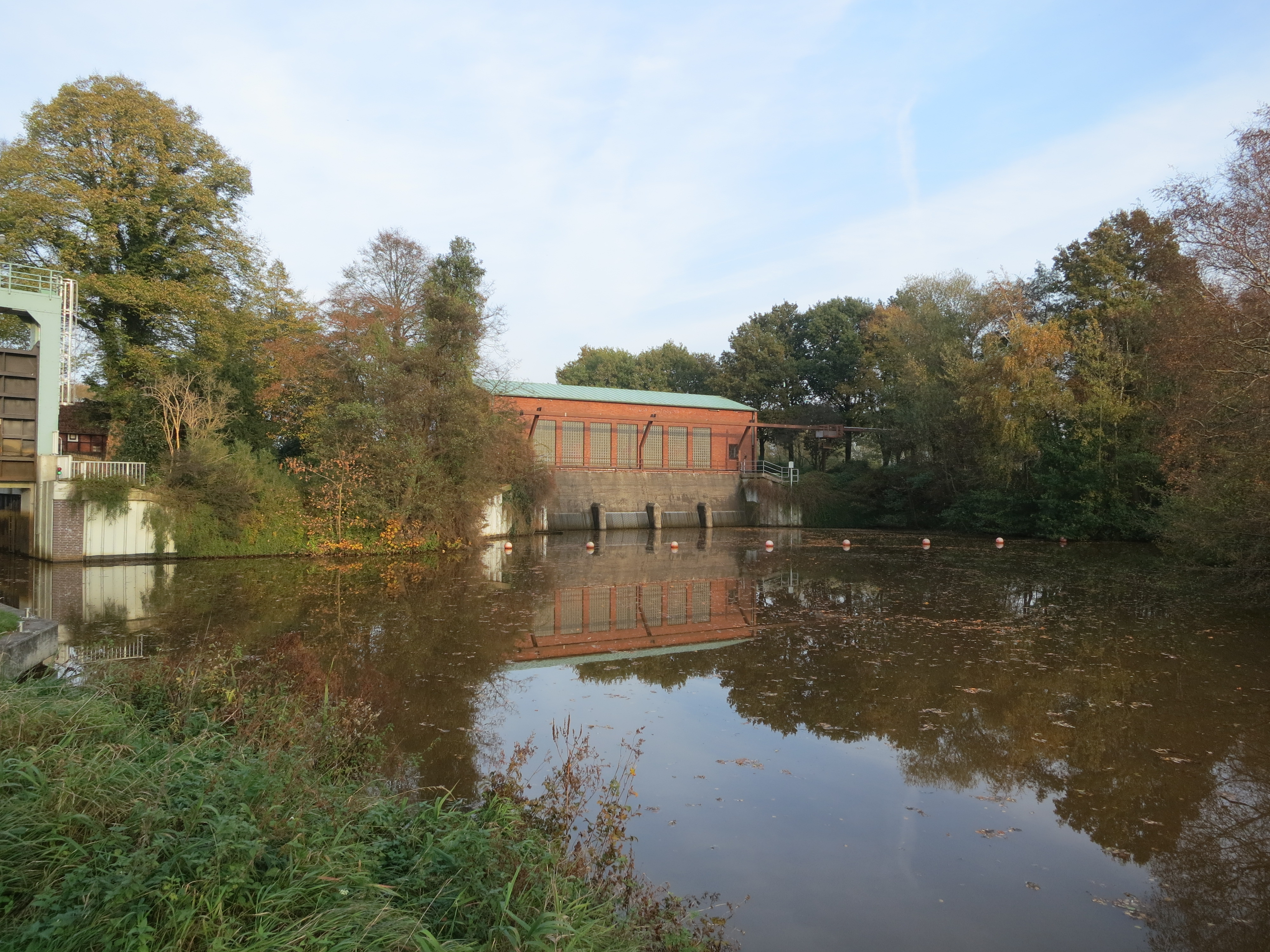 Das Schöpfwerk Kuhsiel, über das der Kuhgraben in die Wümme mündet.